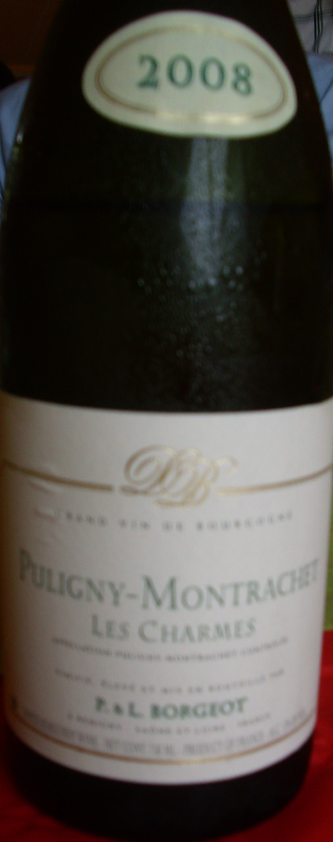 Bouteille de Puligny-Montrachet